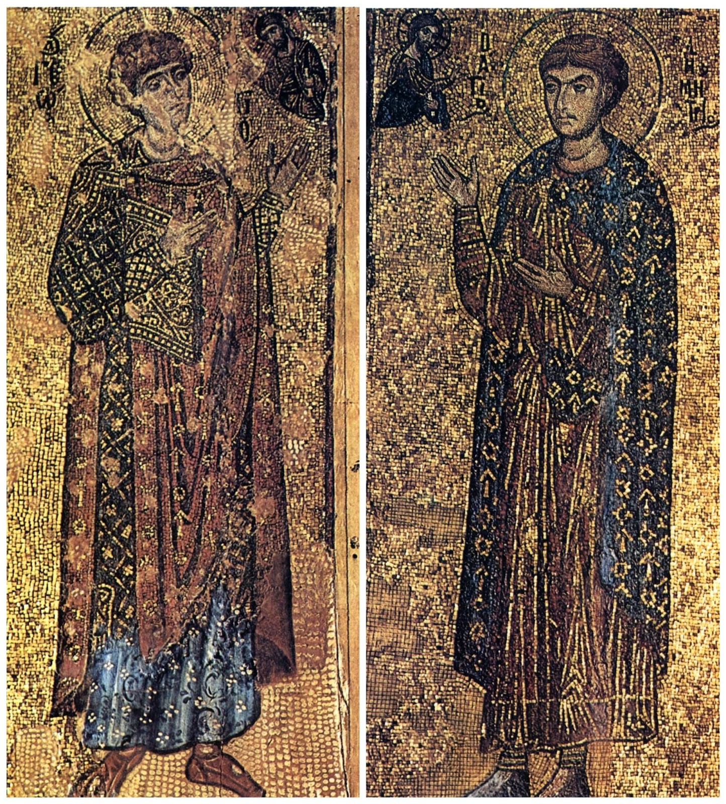 Μονή Ξενοφώντος Αγίου Όρους Δύο φορητές ψηφιδωτές εικόνες με τον Άγιο Γεώργιο και τον Άγιο Δημήτριο, του 12ου αιώνα εργαστήριο τη